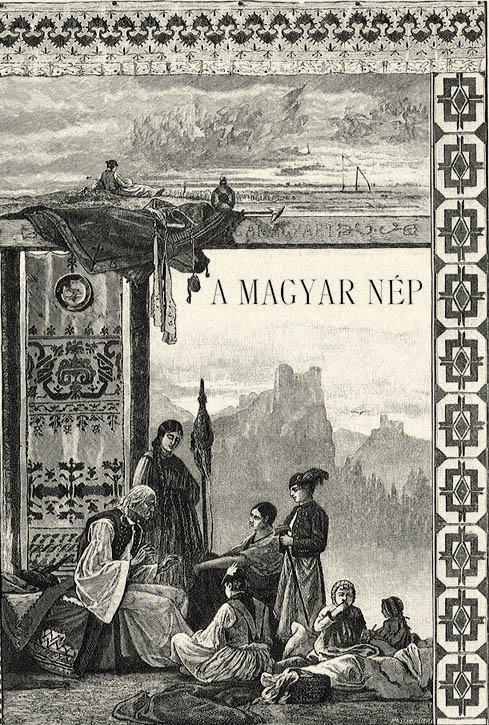 Az Osztrák-Magyar Monarchia Irásban és Képben - A magyar nép (illusztráció)